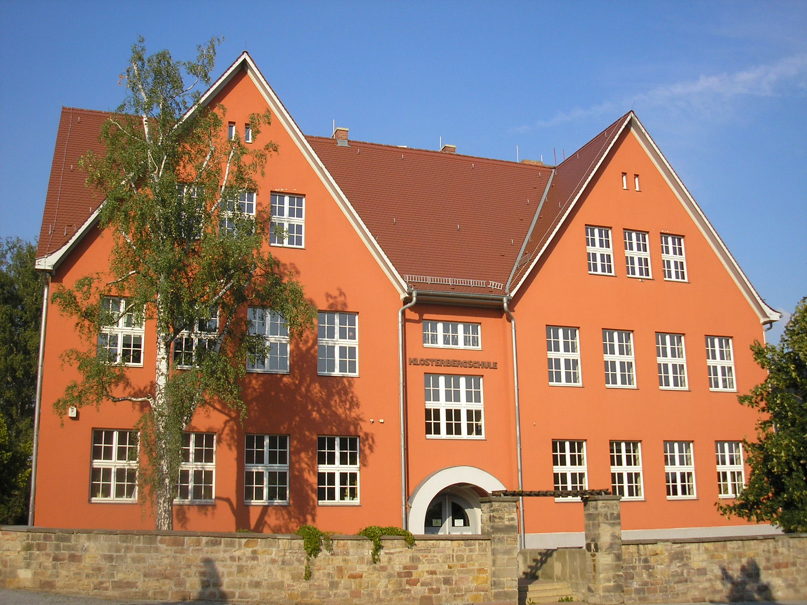 Die Klosterbergschule in Bad Berka (Thüringen).